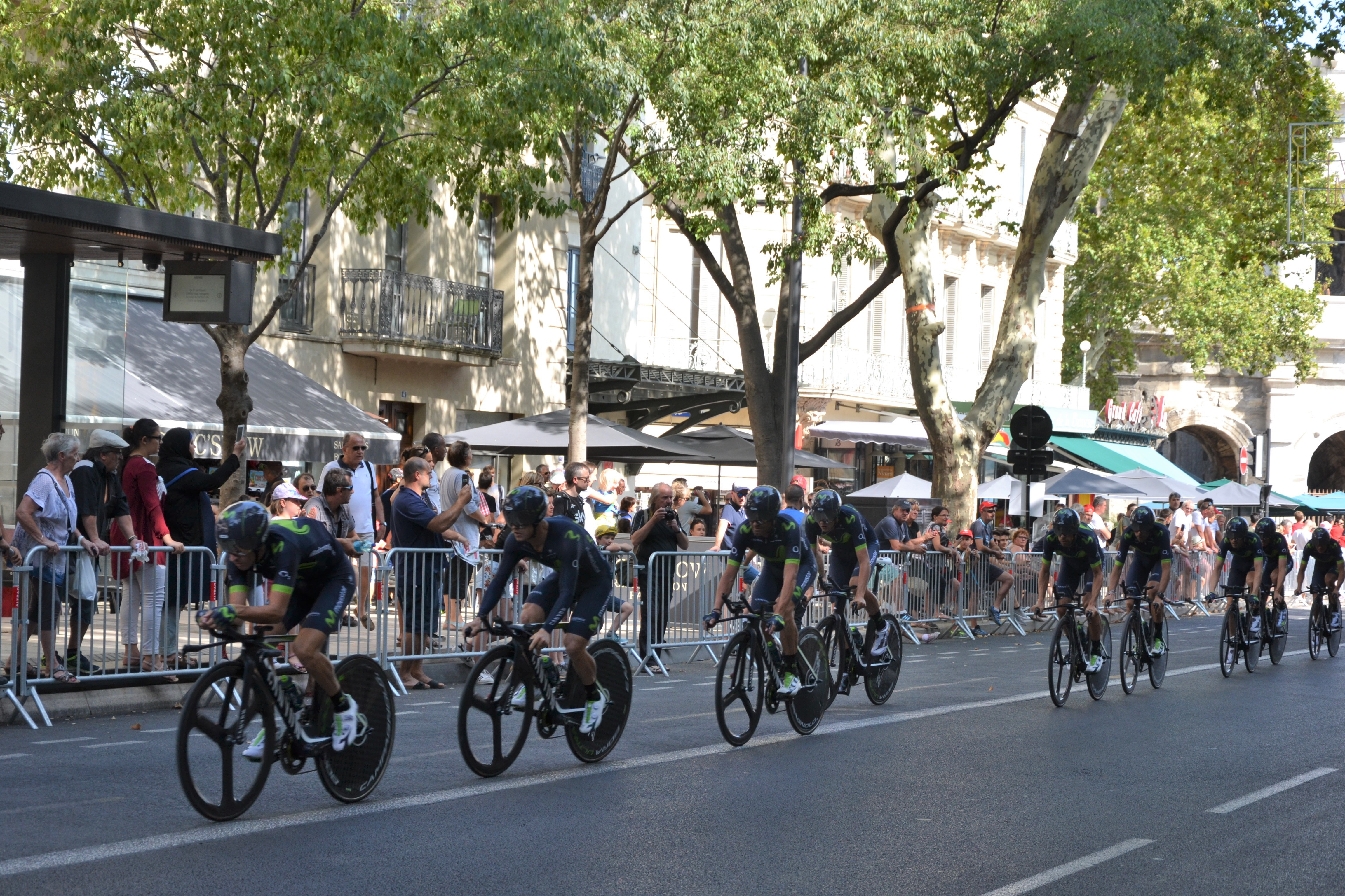 1er étape du Tour d'Espagne 2017, à Nîmes